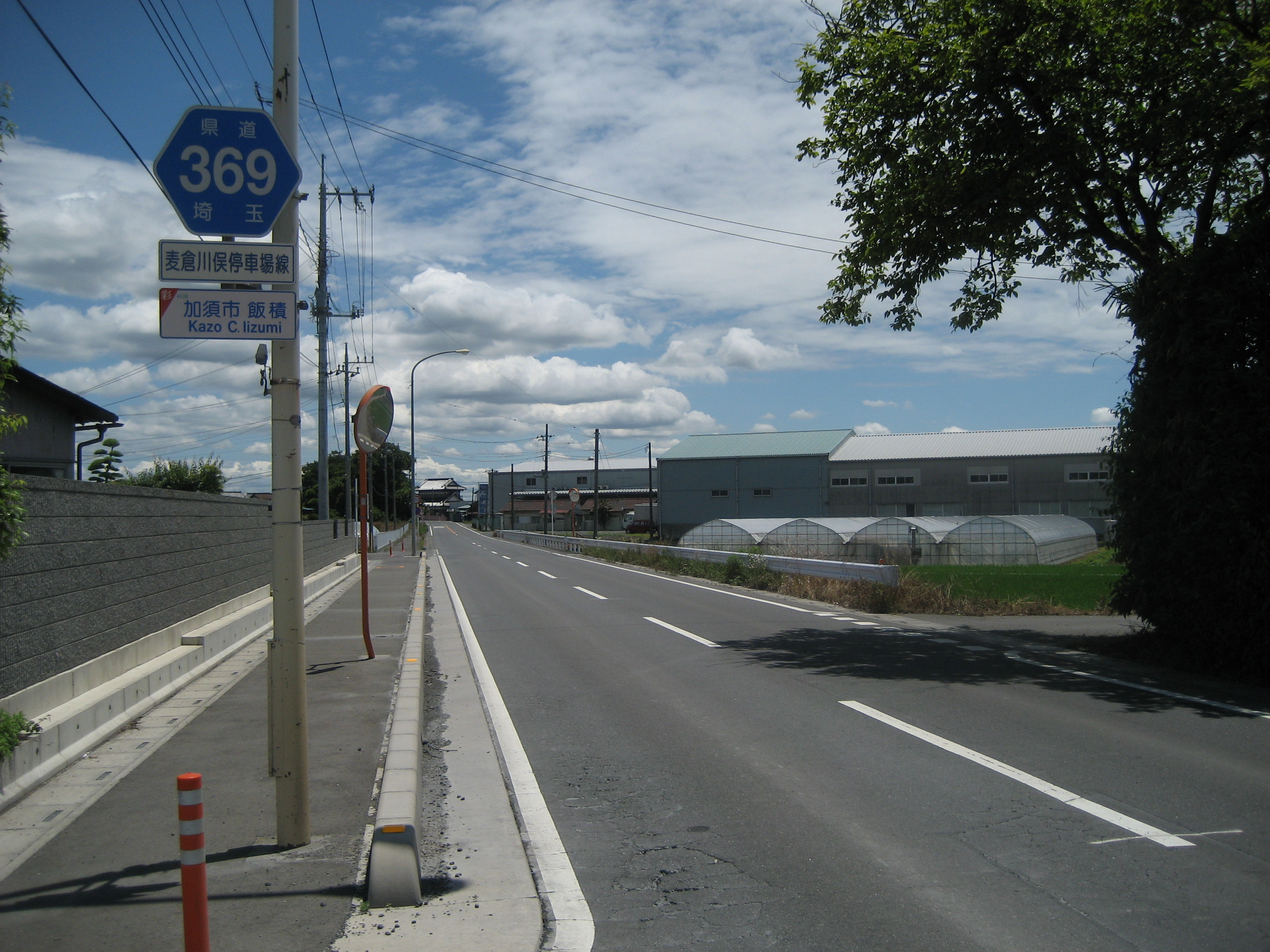 埼玉県道３６９号線加須市内